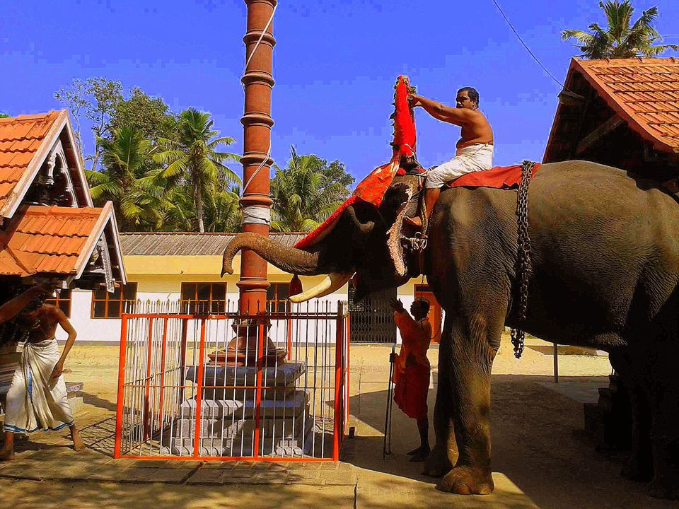 പറയെടുപ്പ്